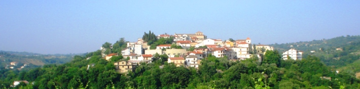 Mirabella Eclano látképe